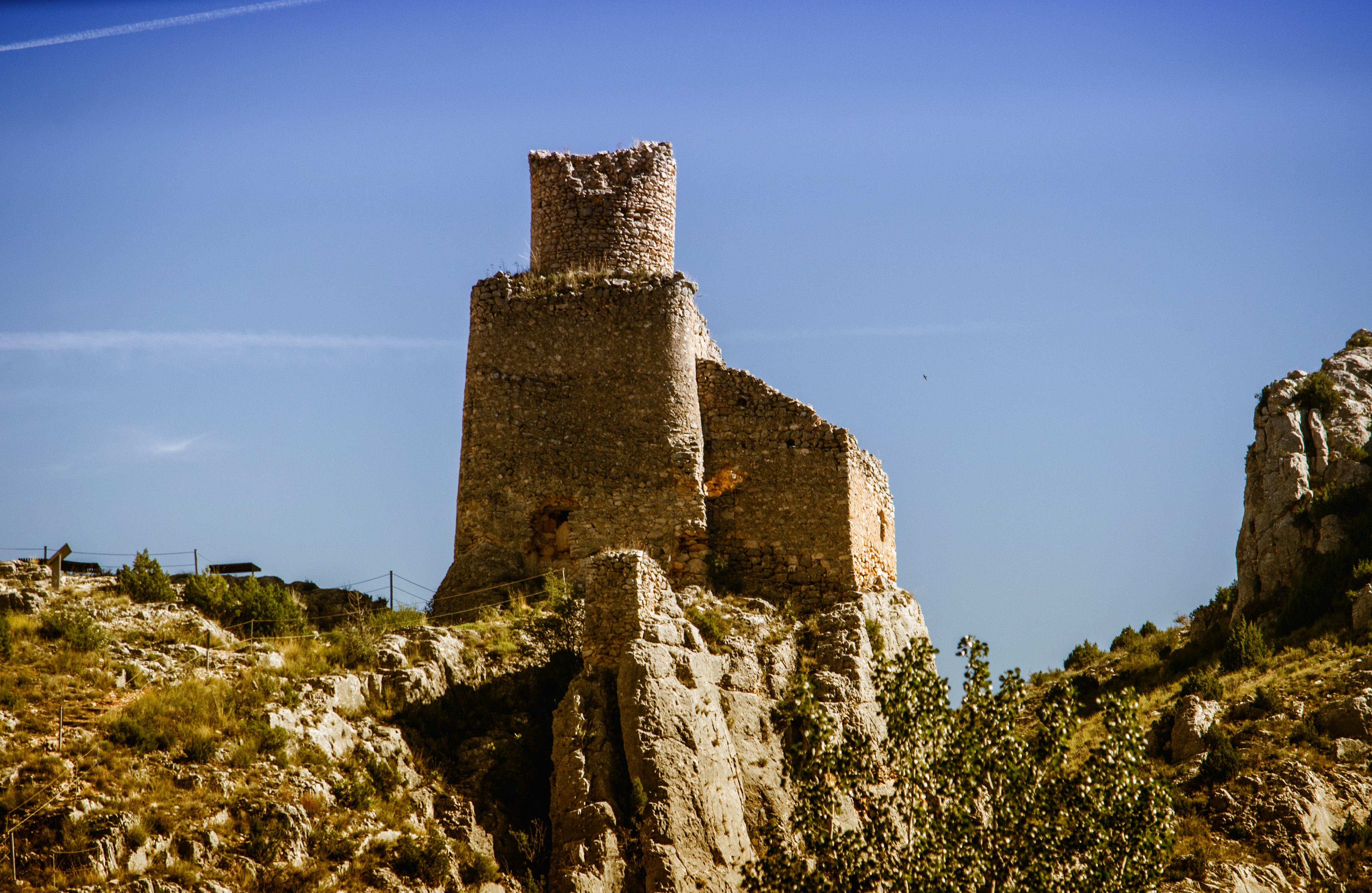 Pequeño castillo situado a las afueras del pueblo zaragozano de Embid de Ariza.